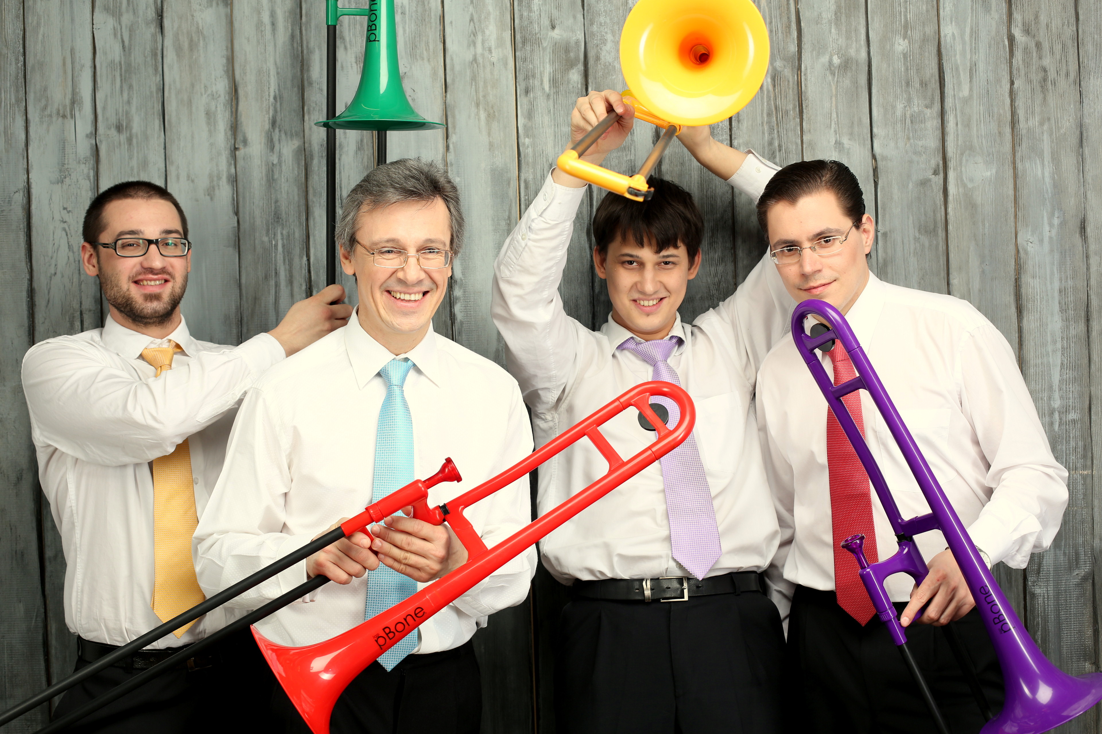 Джазовый коллектив, под управлением Максима Пиганова, состоящий из четырех тромбонов и ритм группы.